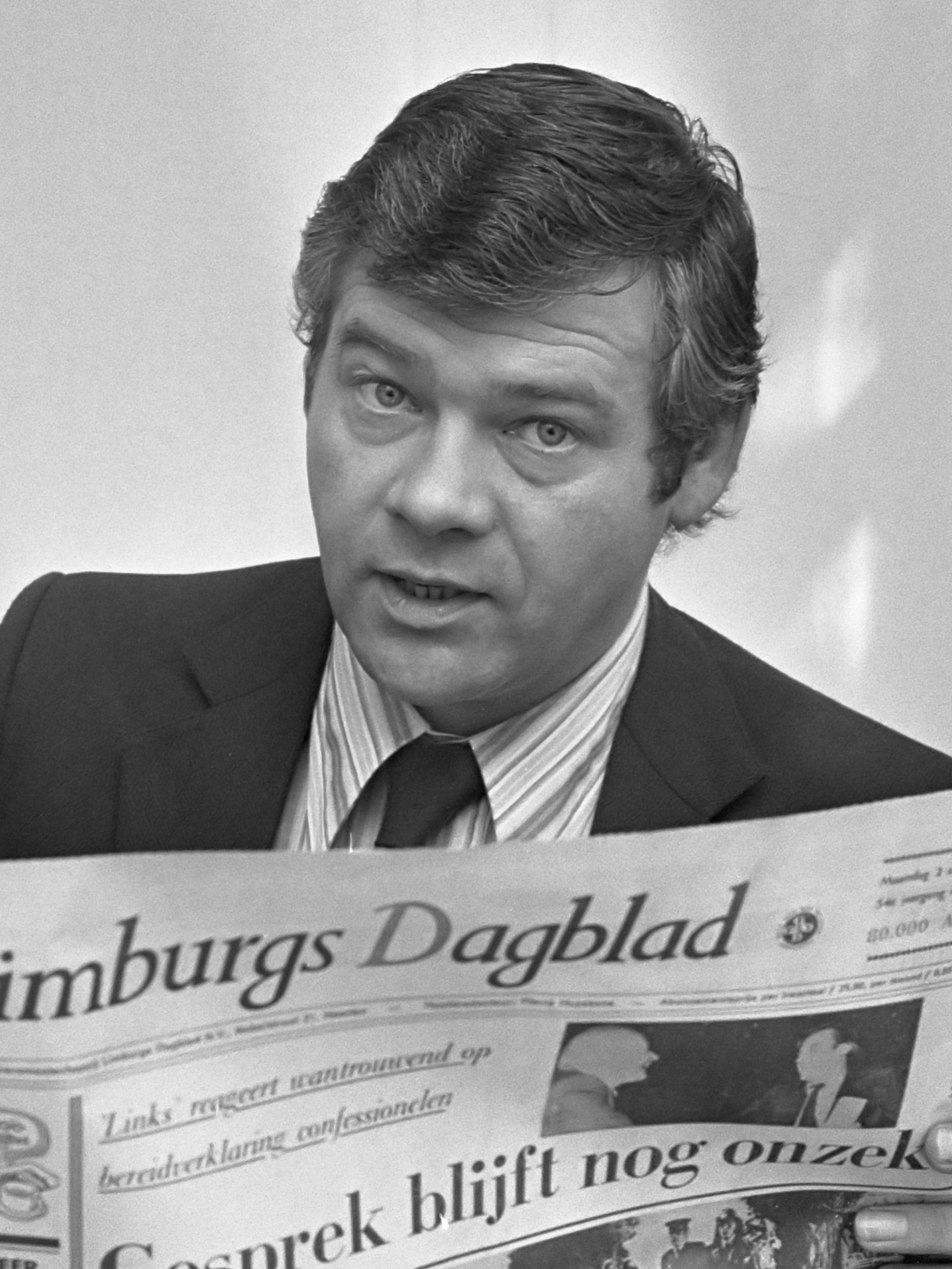 Moeilijkheden bij Limburgs Dagblad i.v.m. overname door De Telegraaf , nieuwe hoofdredacteur Pierre Huyskens met krant 2 oktober 1972